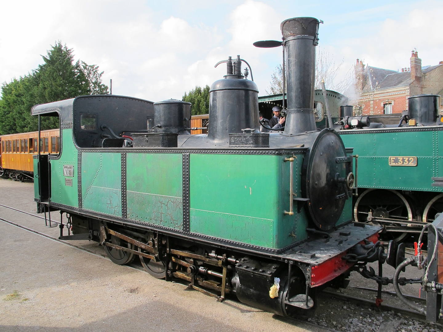 La 030 T Piguet n°4 des tramways de la Corrèze, sur le chemin de fer de la baie de Somme le 28 avril 2013.